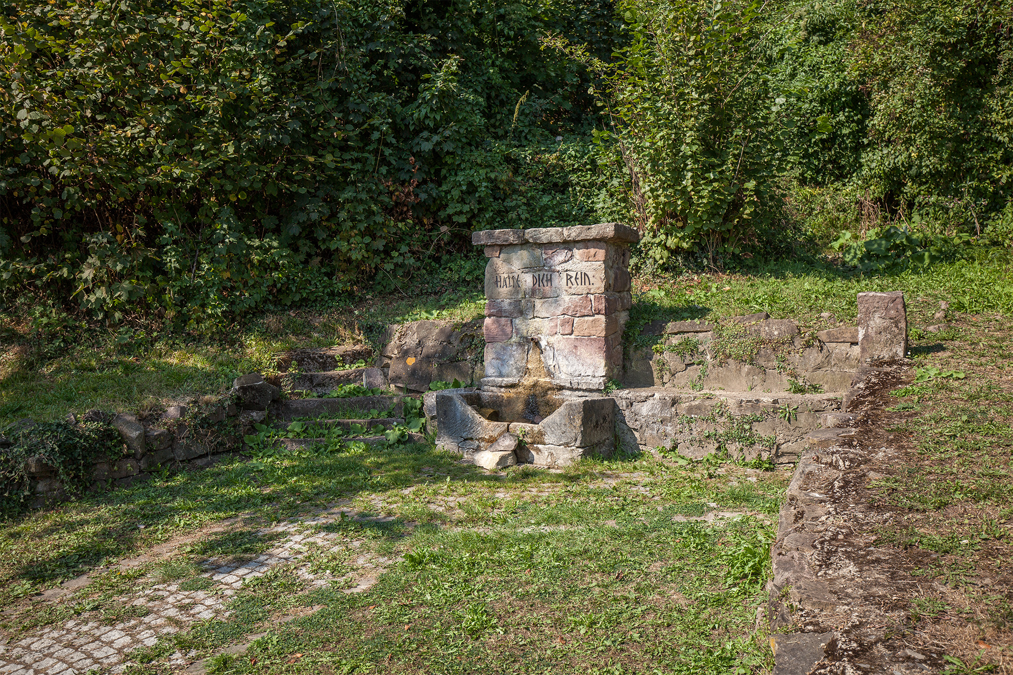 Rastplatz am Sassenborn in Porta Westfalica, Kreis Minden-Lübbecke, Nordrhein-Westfalen. This is a photograph of an architectural monument.It is on the list of cultural monuments of Porta Westfalica